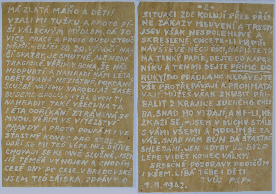 Zprávy rodině o průběhu vyšetřování, podmínkách věznění, svých nadějích a přáních pašoval vězněný plukovník Josef Churavý za zdi pankrácké věznice v Praze pomocí motáků ukrytých ve špinavých kapesnících. Ani po zabavení všech psacích potřeb Churavý v této činnosti neustal. Musel si však vystačit s psaním na toaletní papír ostrým hrotem z kousku válečného mýdla. Toto je ukázka jednoho z "dopisů" (motáků) datovaného dnem 1. února 1942: Text zprávy: Má zlatá Máňo a děti! Vzali mi tužku a proto píši válečným mýdlem. Dá to více práce a proto budu stručnější. - Blíží se 20té výročí naší svatby. Je smutné, ale není tragické. Věřím v Boha, že nás neopustí a nahradí nám léta obětované nezištné, pokorné službě našemu národu. Až zase budeme spolu, chtěl bych Ti nahradit také všechna ta léta odříkání ztrávená se mnou. Věřím ve vítězství pravdy a proto doufám i ve šťastný konec pro sebe. - Daří se mi teď lépe než dříve. Chovají se ke mně slušně. Jsem již téměř vyhojen a chodím celé dny po cele. V Bredovské jsem teď zřídka. Zprávy o situaci zde kolují přes přísné zákazy mluvení a tresty, jsou však nespolehlivé a skreslené. Chcete-li mi při návštěvě něco říci, napište to na tenký papír, dejte do kapesníku a ten mi dejte přímo do ruky! Do prádla nic nedávejte, vše protřepávají a prohmatávají, můžeš však zkusit přibalit dva krajíce suchého chleba. Snad ho vydají a ne-li, nezkazí se. - Jsem v duchu stále s Vámi všemi a modlím se za vás. Snad nám Bůh dá šťastné shledání. Jen kdyby už bylo lépe vidět konec války! Srdečné pozdravy rodičům i všem. Líbá Tebe i děti (1.II.1942) Tvůj Pepa.